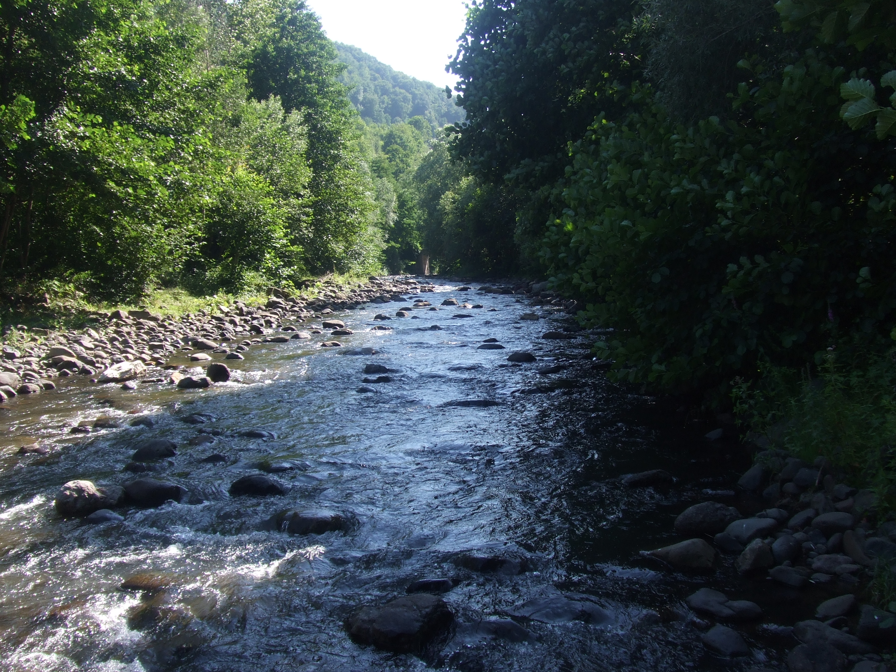 Ordu iline bağlı Aybastı ilçesinden bir görünüm.